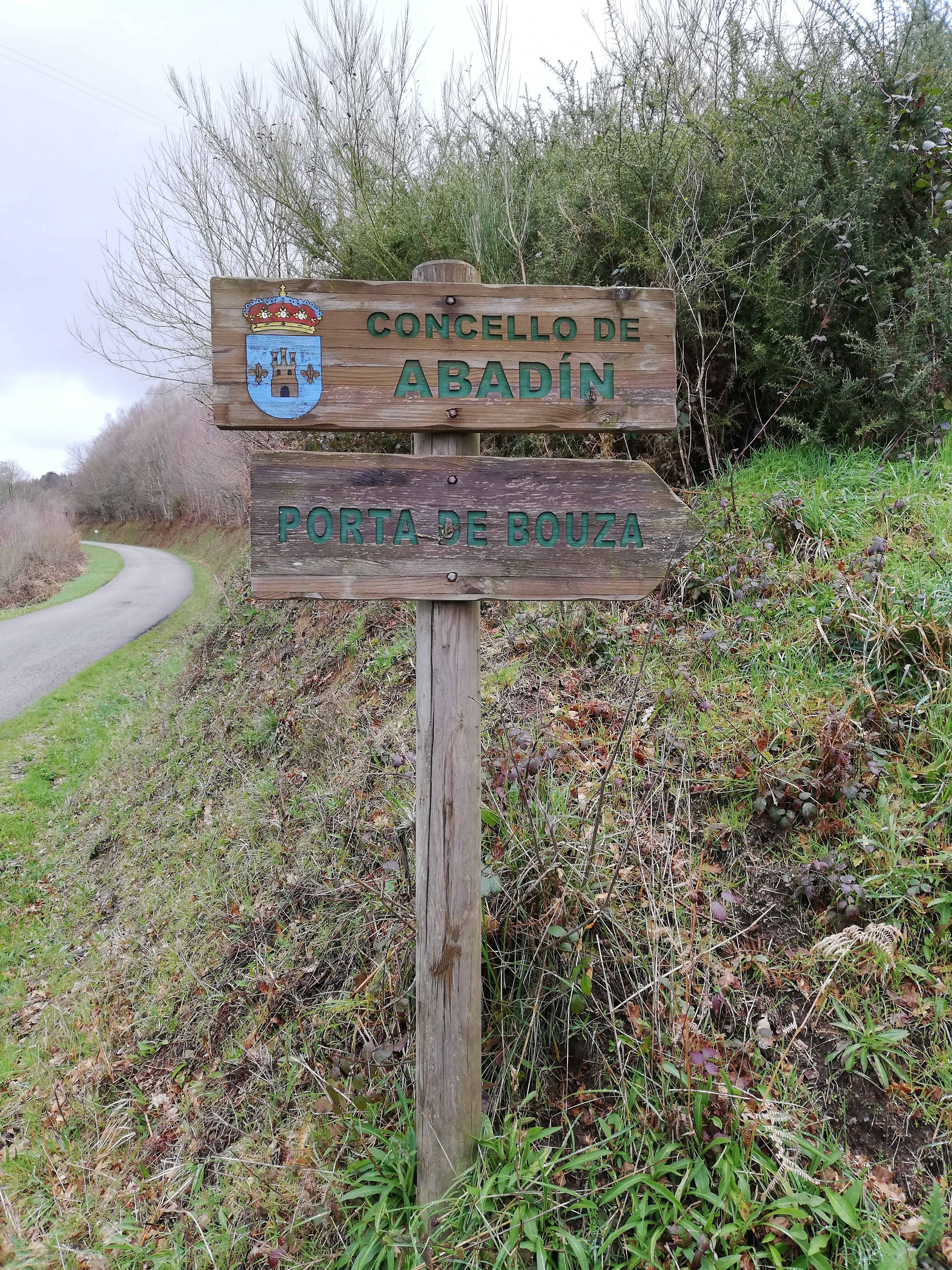 Sinal do lugar da Porta de Bouza, Fanoi, Abadín.